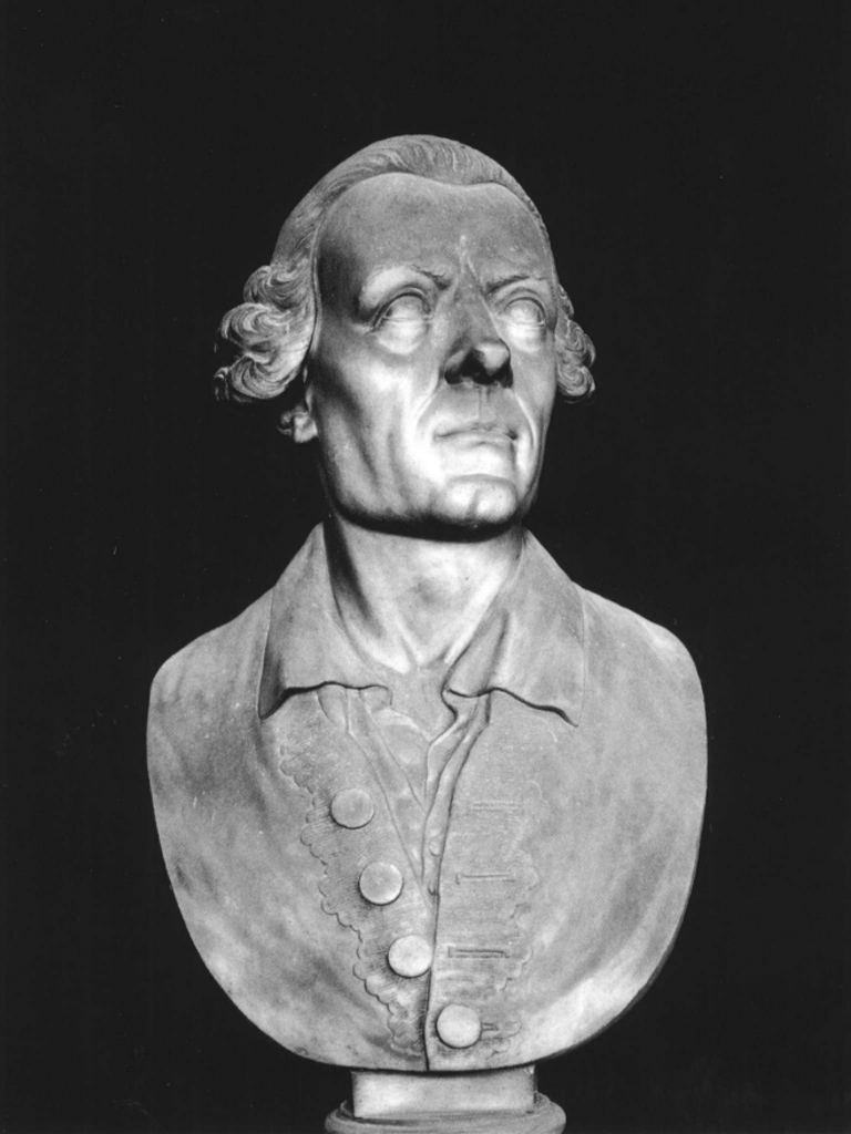 Busto di Gaspare Gozzi, opera di Angelo Giordani precedente al 1847. Il busto fa parte del Panteon Veneto, conservato presso Palazzo Loredan di Campo Santo Stefano a Venezia.